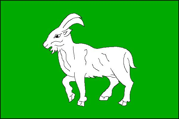 Vlajka obce Morávka (okres Frýdek-Místek)